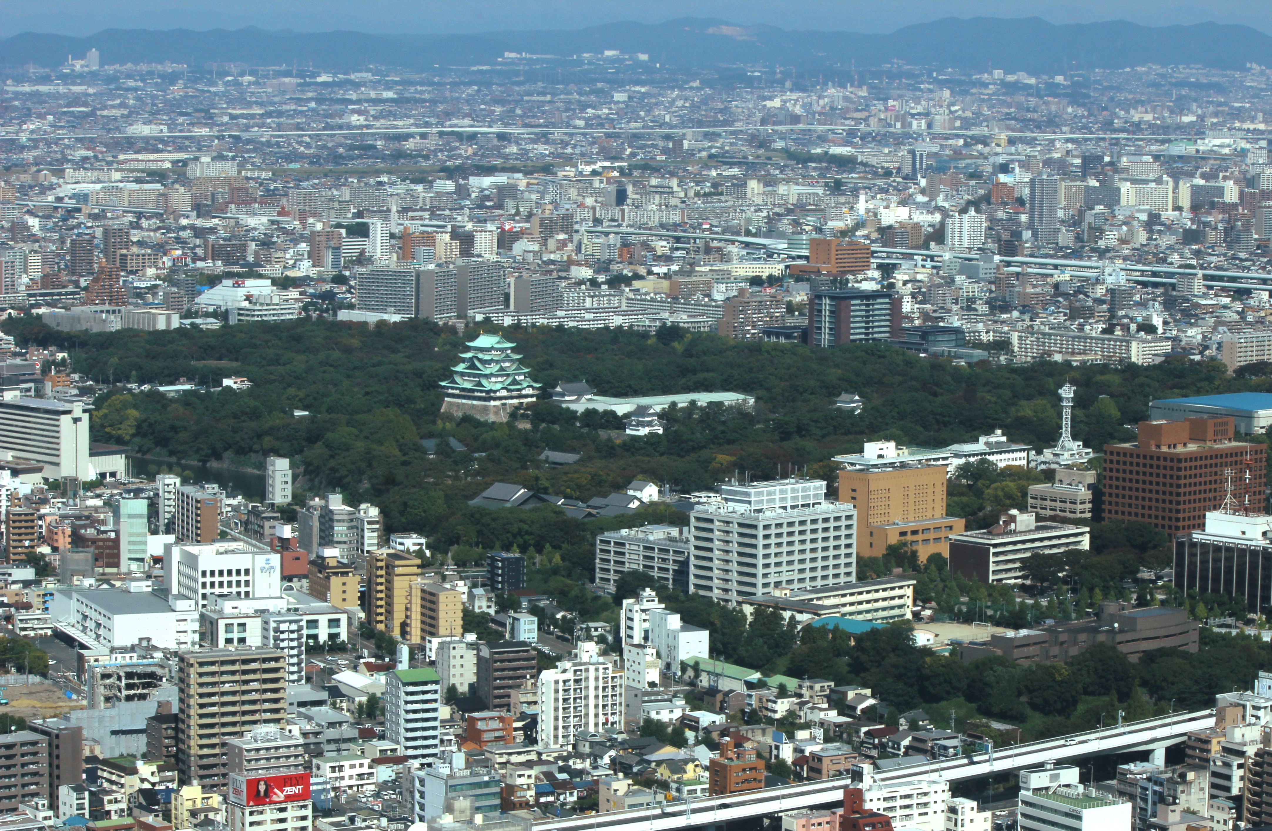 名古屋城とその奥の名二環を望む